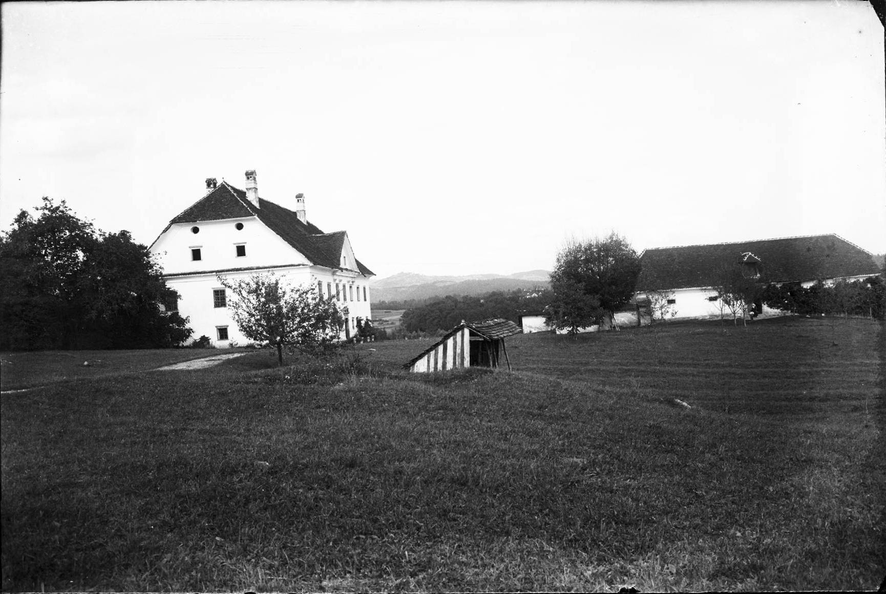 Graščina Grumlof v Šentpavlu na Dolenjskem.